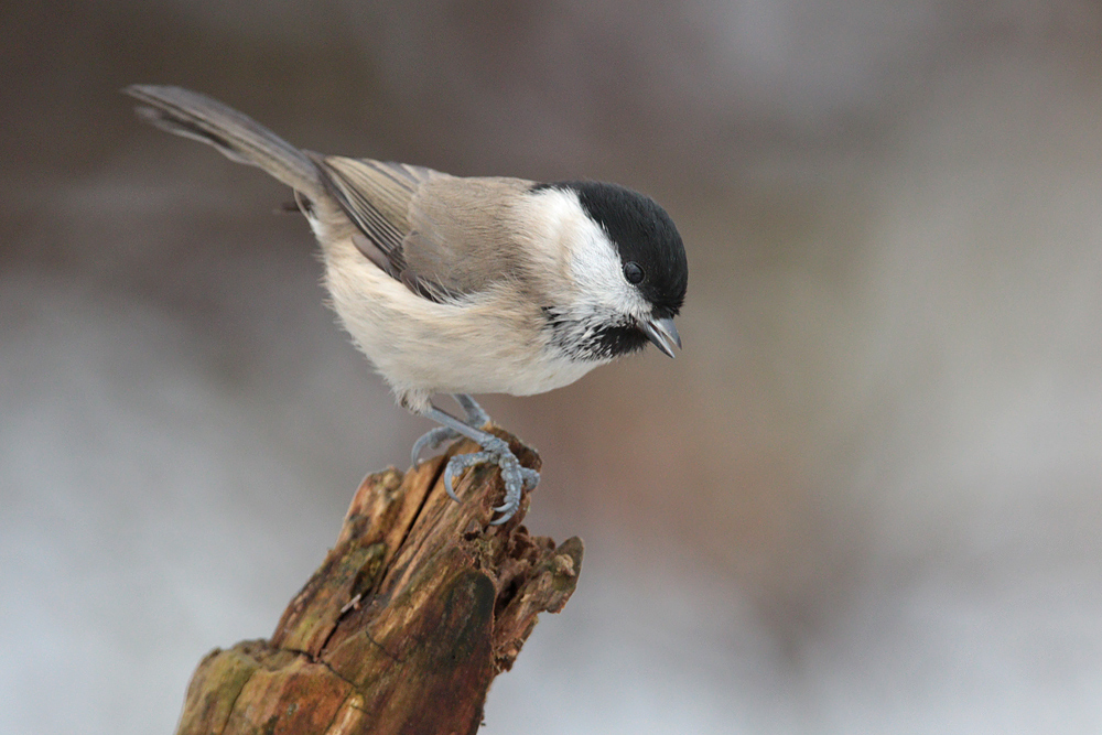 Sumpfmeise in der Nähe des Ilkerbruchs